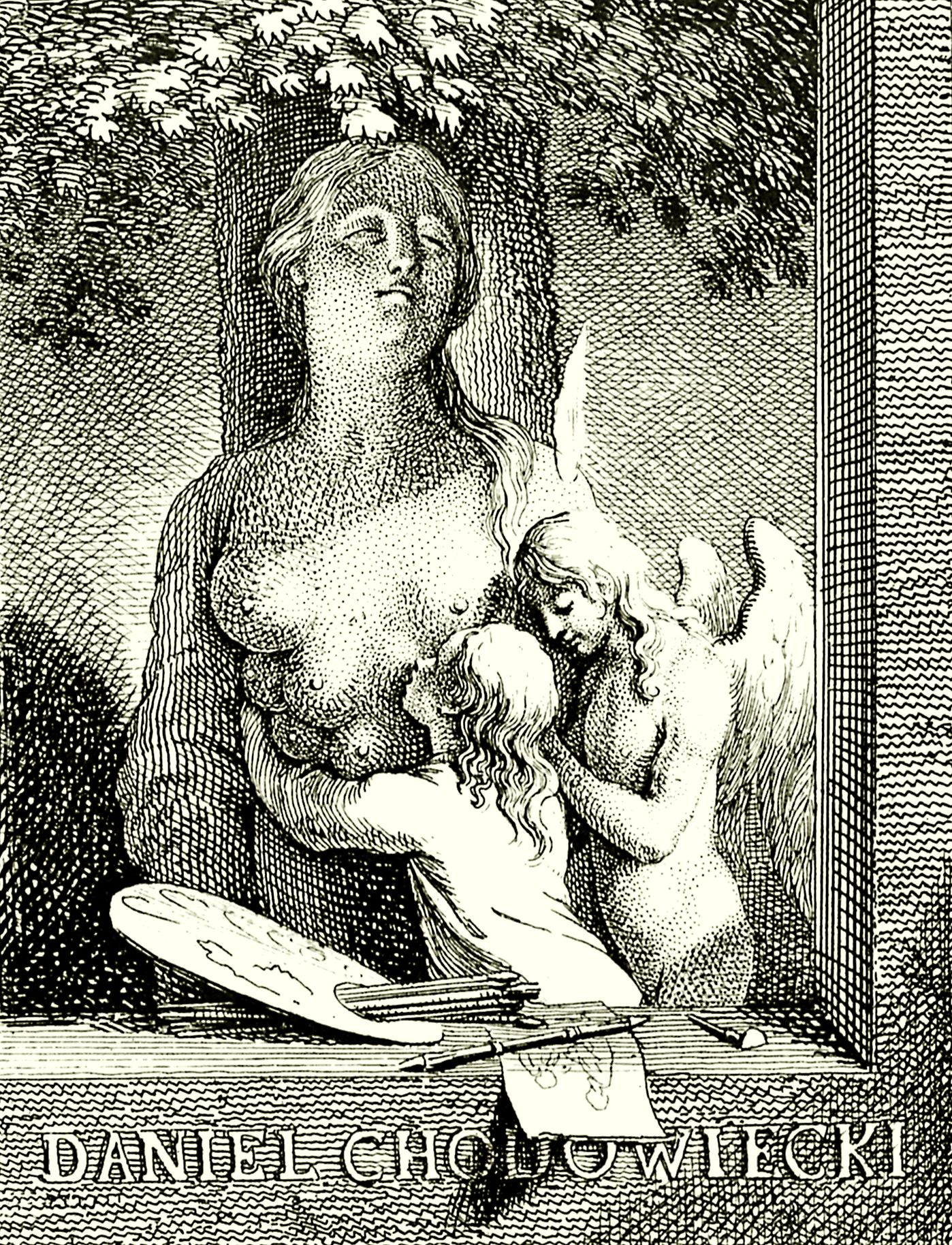 Daniel Chodowiecki: Ex Libris für seine eigene Bibliothek. Kupferstich.